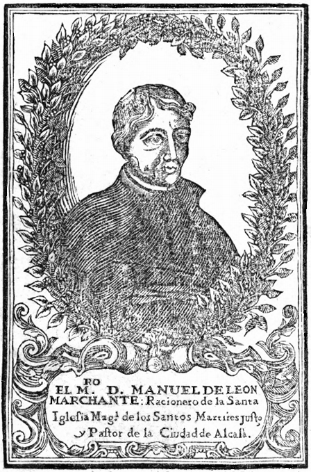 Manuel de León Marchante (Pastrana, 1631 - Alcalá de Henares, 1680) poeta y dramaturgo español del Siglo de Oro. Desempeñó los puestos de Comisario del Santo Oficio de la Inquisición, Capellán Real y del Colegio de Caballeros Manriques de la Universidad de Alcalá, Racionero de la Iglesia Magistral de los Santos Justo y Pastor de Alcalá de Henares.